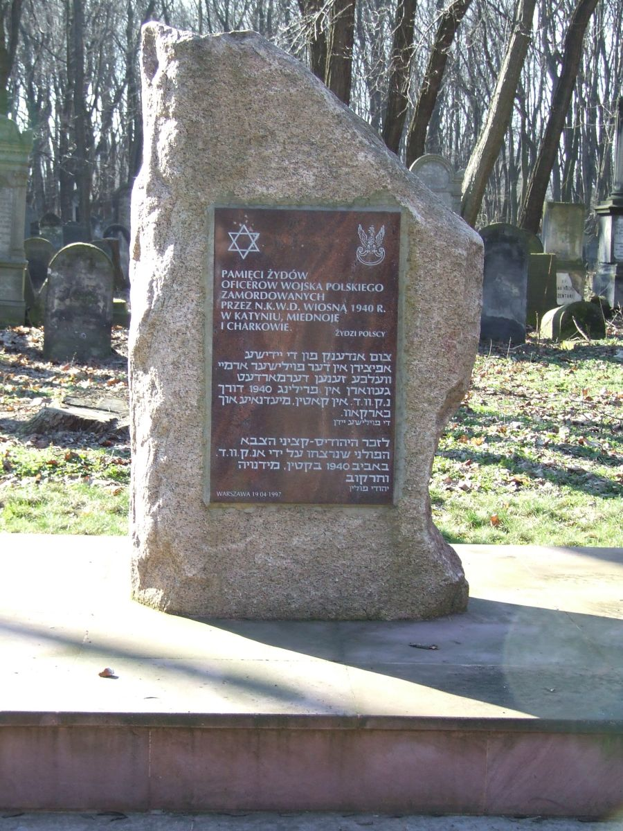 Pomnik ofiarom Katynia